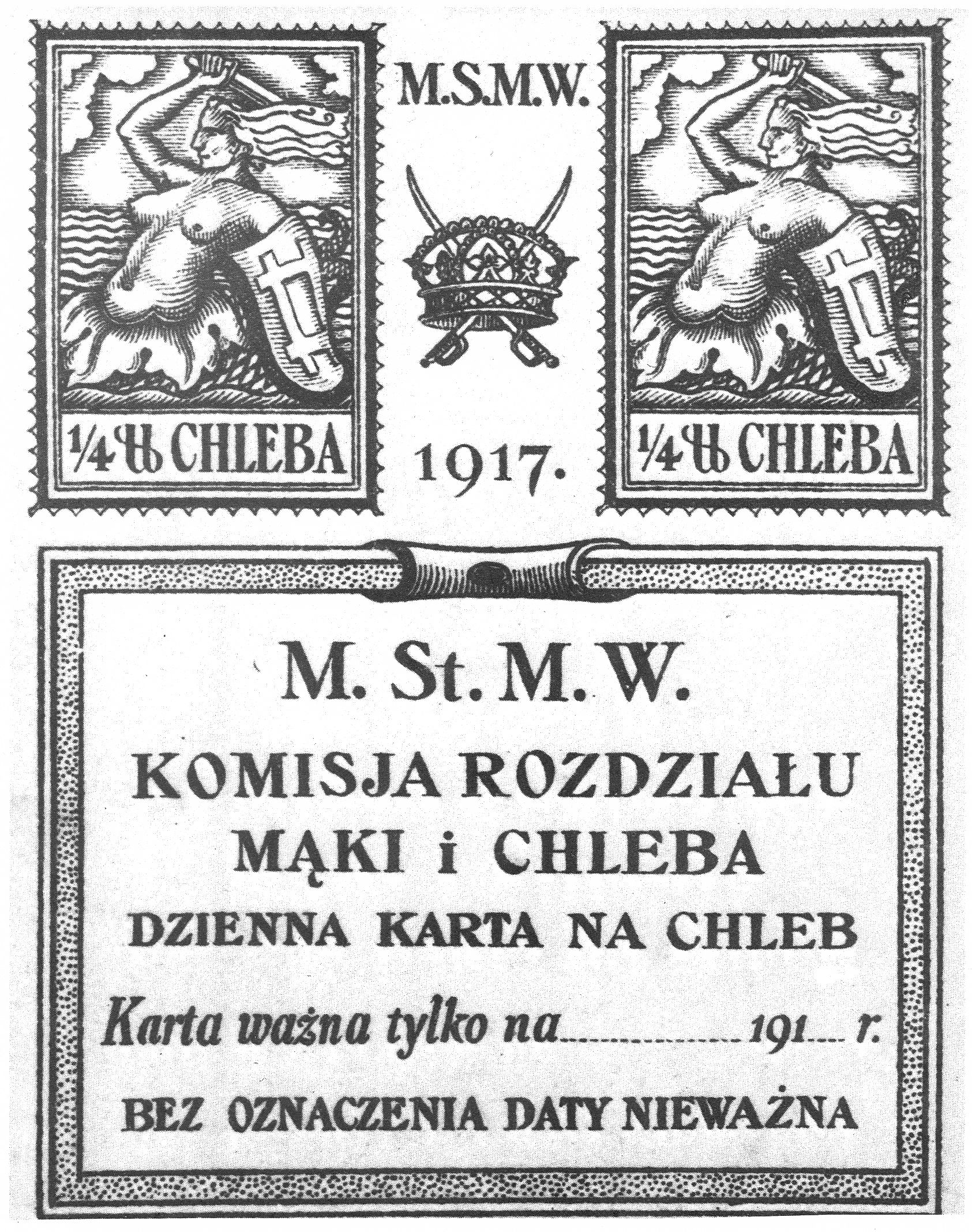 Kartki żywnościowe w Warszawie